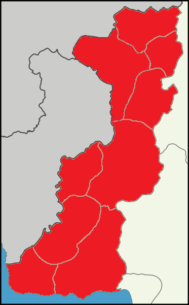 Edirne'de 2014 Türkiye cumhurbaşkanlığı seçimi sonuçları